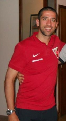 Evandro Goebel.